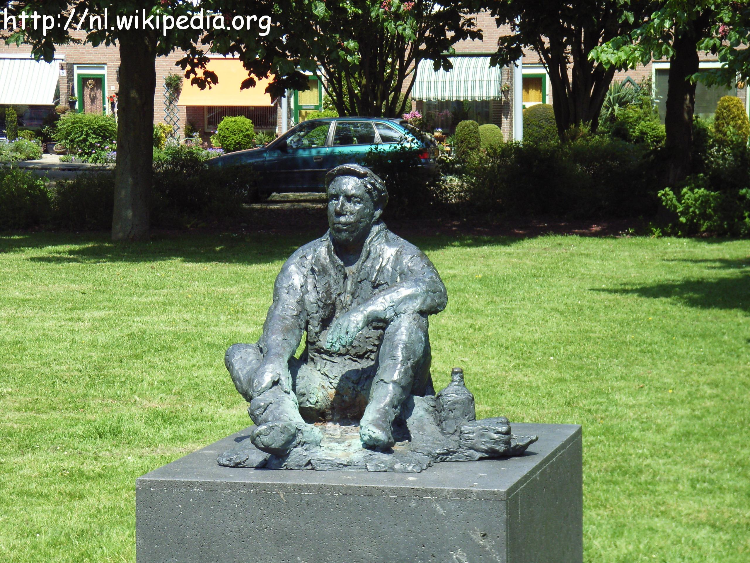 Het standbeeld van de veenarbeider staat symbool voor de eerste inwoners van Lisserbroek. Deze afbeelding heeft in de linkerbovenhoek tekst staan. Dit is gedaan omdat een of andere @#^%$%$&^*kloon in mijn ogen unfair met onze media omgaat. Diegene die graag deze afbeelding zou hebben zonder tekst in de linkerbovenhoek, kan mij contacteren op mijn overlegpagina, of een Wiki-email sturen met dit verzoek. Hierin graag vermelden waarvoor de afbeelding gebruikt gaat worden. Koos Jol 27 mei 2005 21:06 (CEST)